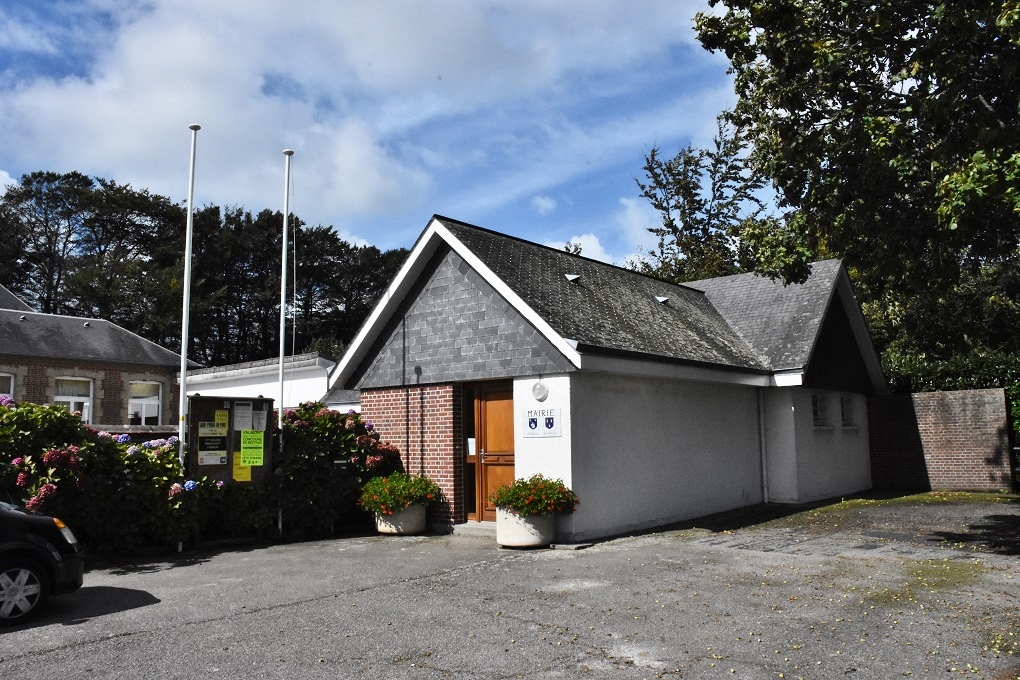 la Mairie